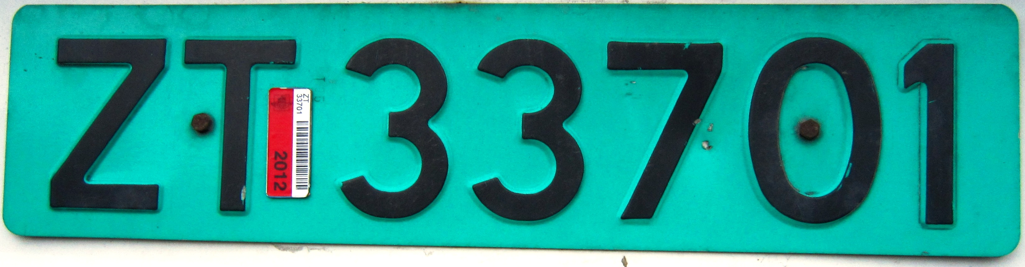 Noorwegen kenteken groen oud